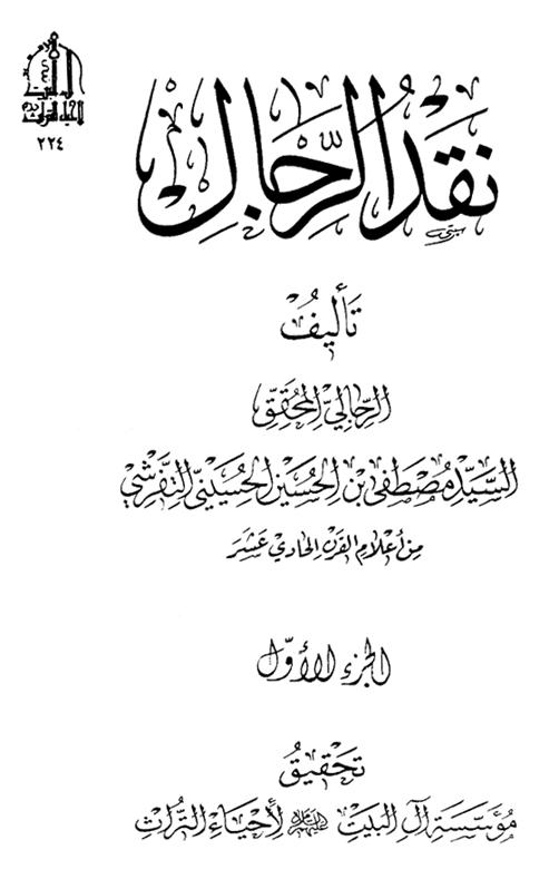 كتاب نقد الرجال